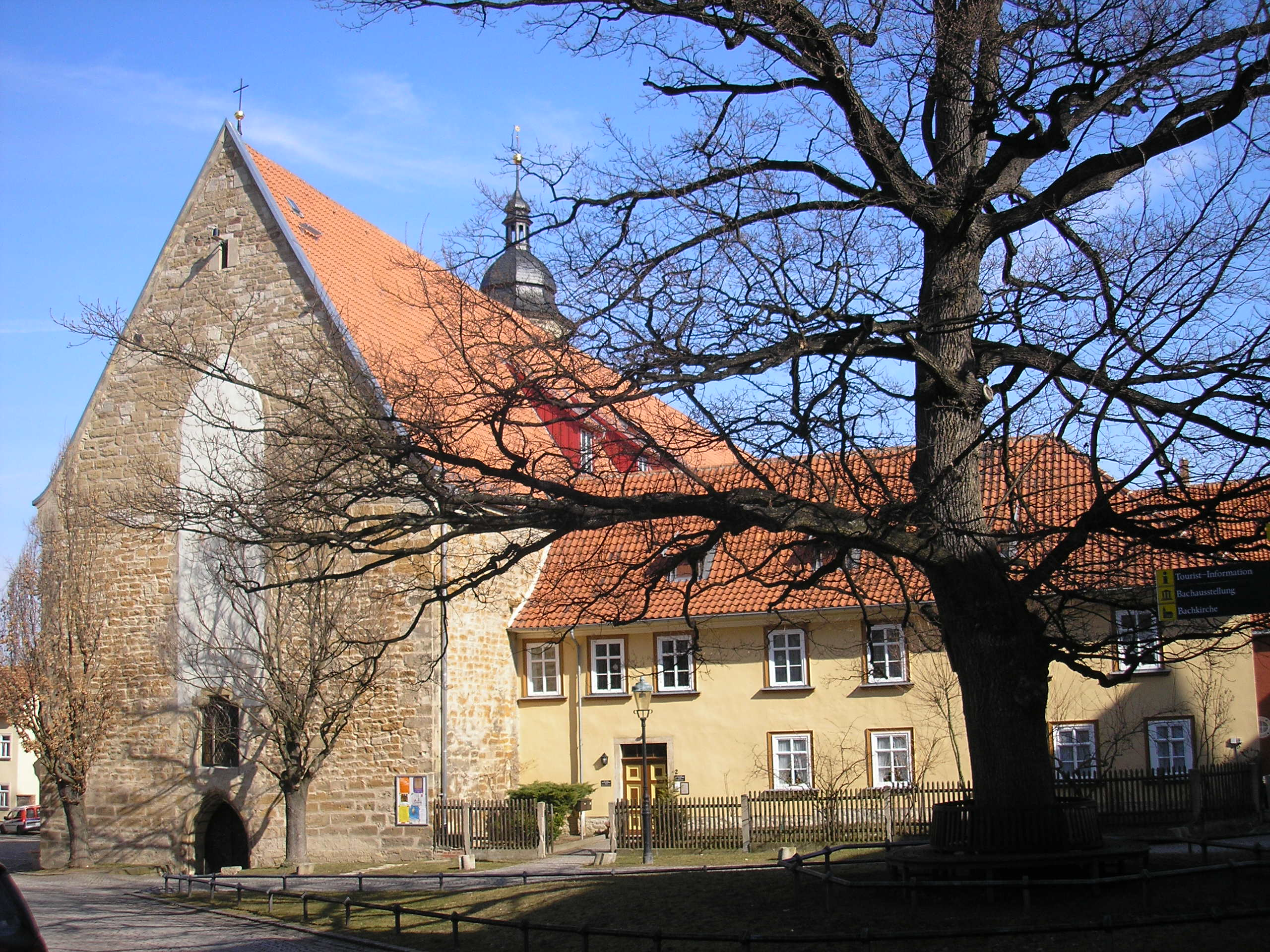 Die Oberkirche in Arnstadt (Thüringen).